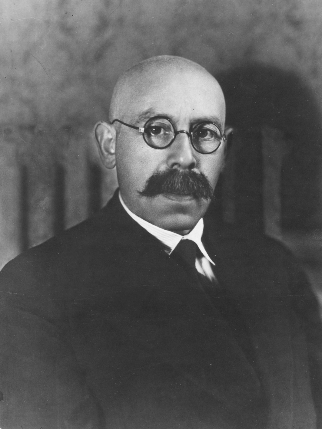 Самойлович Рудольф Лазарович